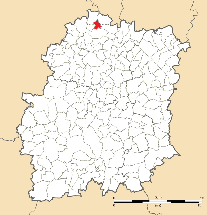 Carte de position d'Igny en Essonne